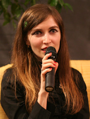 Barbara Baraldi durante la presentazione di un suo libro